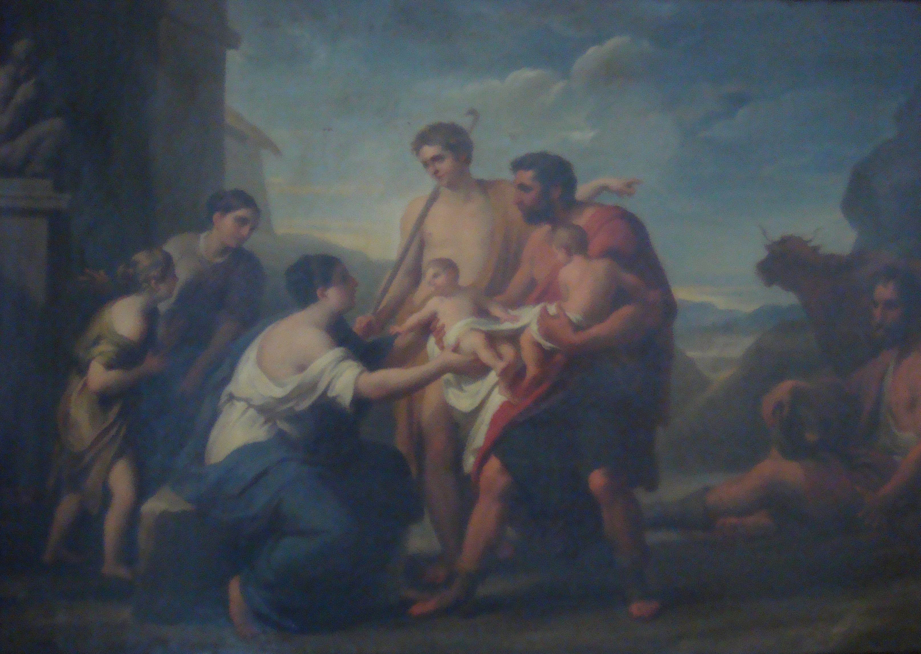 La scoperta di Romolo e Remo